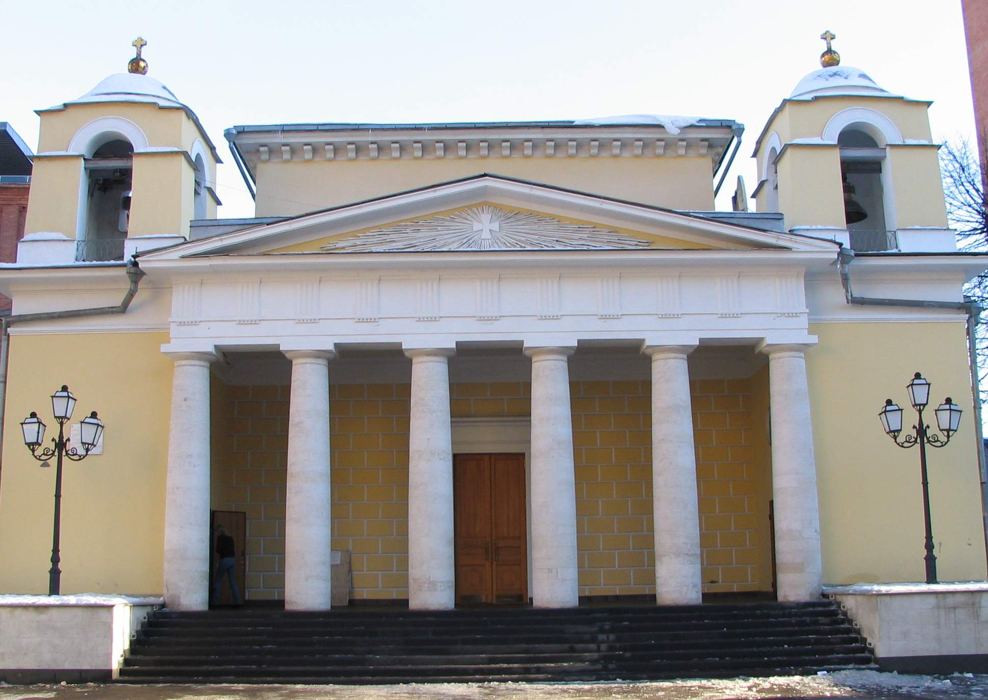 Façade de St Louis à Moscou